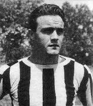 Juan Vairo en Juventus